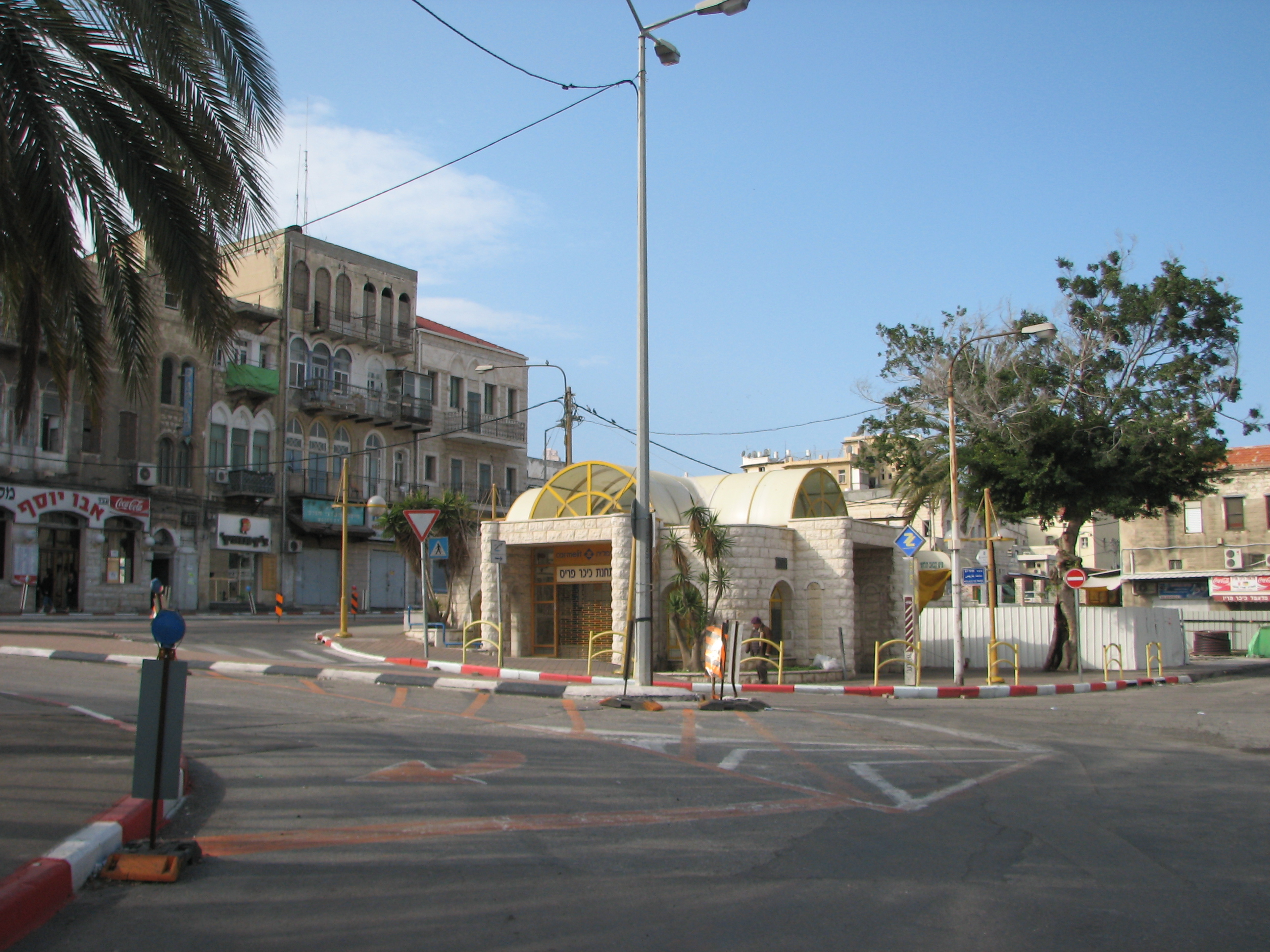 Paris Square, Haifa. until 1954 was called Hamra square. it was the transportation hub of Haifa and the gate to Kasbah כיכר פריס בחיפה בעיר התחתית. בתקופת המנדט הבריטי נקראה כיכר חמרה, זו היתה הכיכר המרכזית בחיפה. בשנת 1954 בעקבות הקמת הכרמלית., שונה שמה לכיכר פריס תחנת כרמלית, מבט לכוון דרום מרחוב נתנזון. מאחור הבית בשדרות המגינים 1